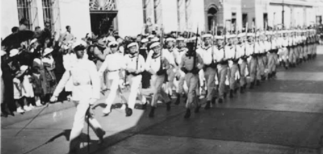 Visita del barco alemán Emden en enero de 1936.